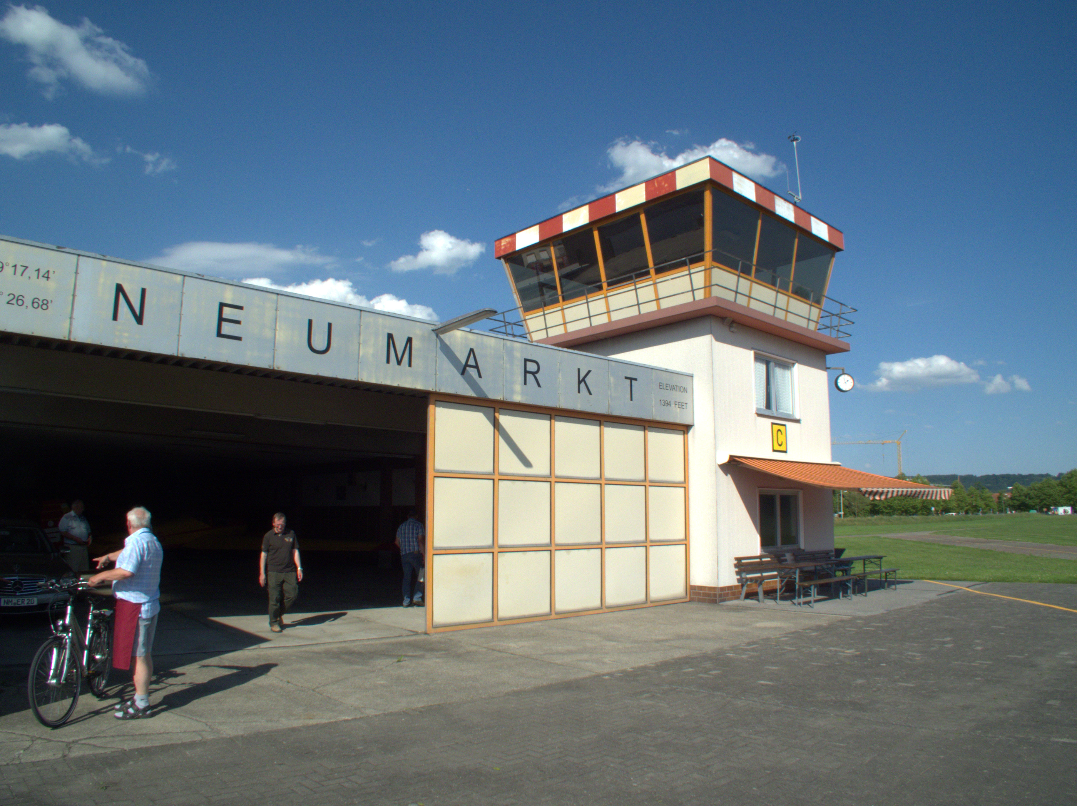 Flugplatz Neumarkt in der Oberpfalz am der Nürnberger Straße